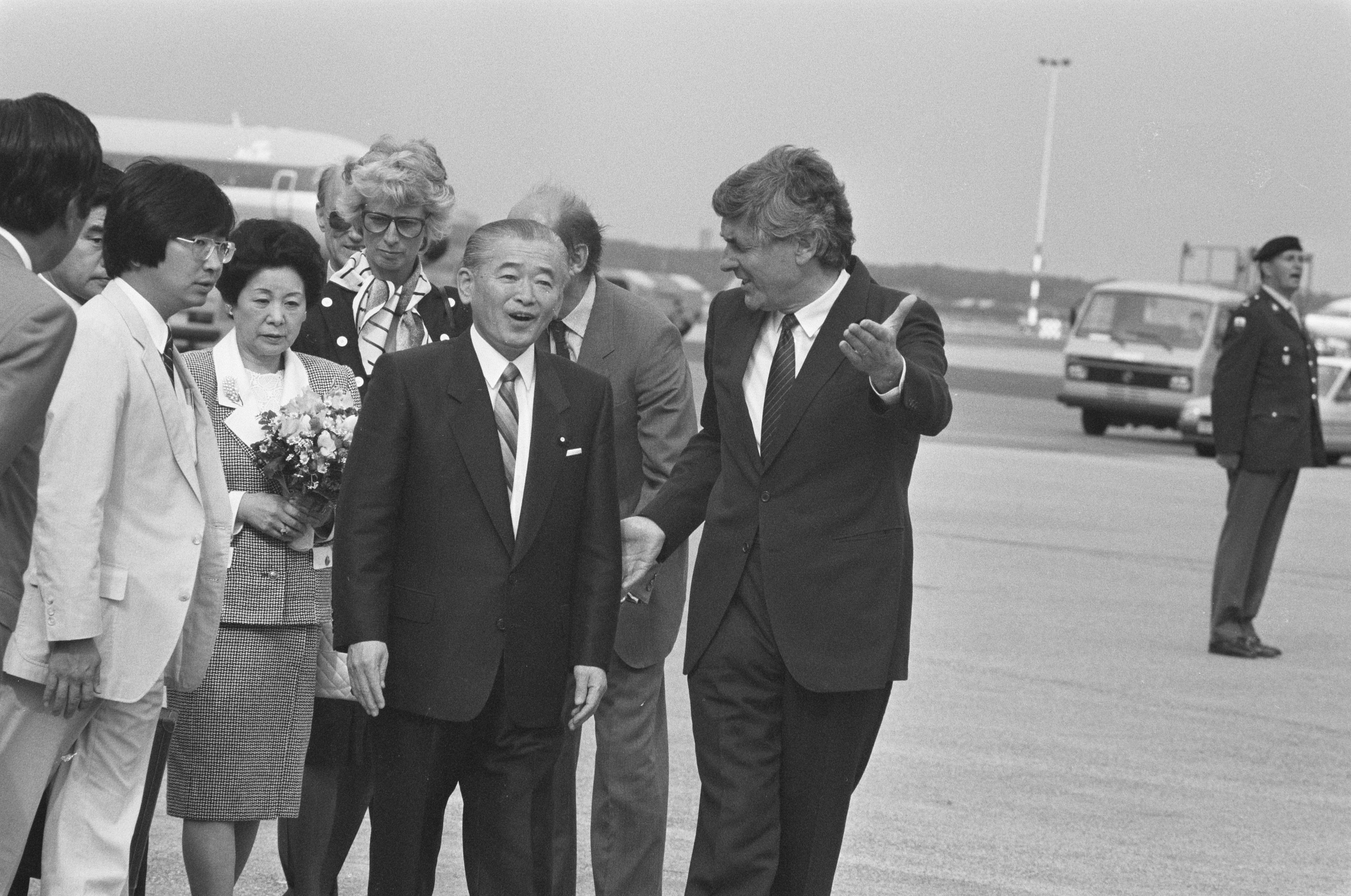 Collectie / Archief : Fotocollectie Anefo Reportage / Serie : [ onbekend ] Beschrijving : Premier Lubbers verwelkomt Japanse premier Takeshita o p Schiphol Datum : 3 juni 1988 Locatie : Noord-Holland, Schiphol Persoonsnaam : Lubbers, Ruud, Premier Takeshita Fotograaf : Bogaerts, Rob / Anefo Auteursrechthebbende : Nationaal Archief Materiaalsoort : Negatief (zwart/wit) Nummer archiefinventaris : bekijk toegang 2.24.01.05 Bestanddeelnummer : 934-2600